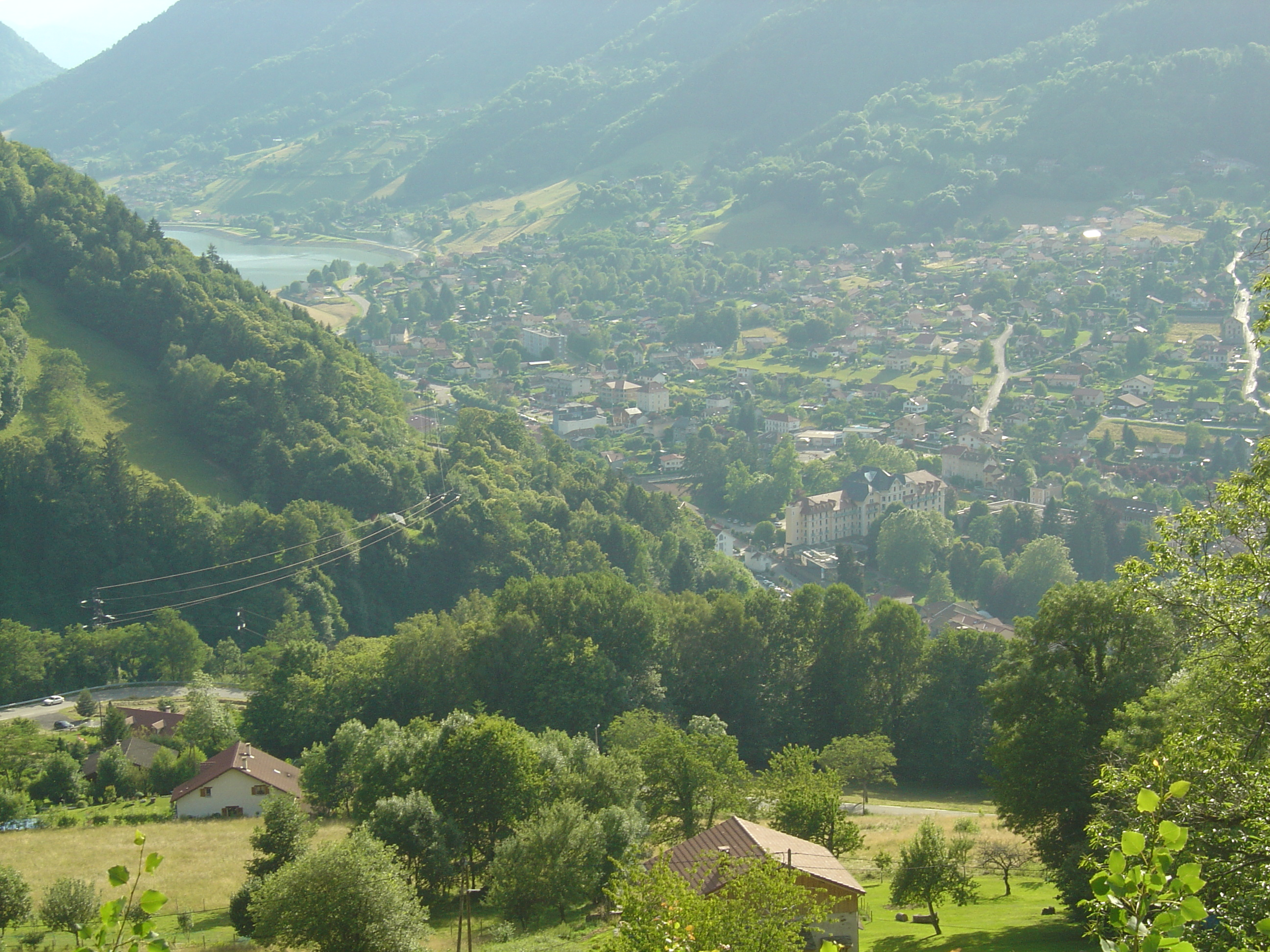 Vue sur une partie de la ville d'Allevard-les-Bains et son plan d'eau depuis les premiers kilomètres de la route du Collet d'Allevard